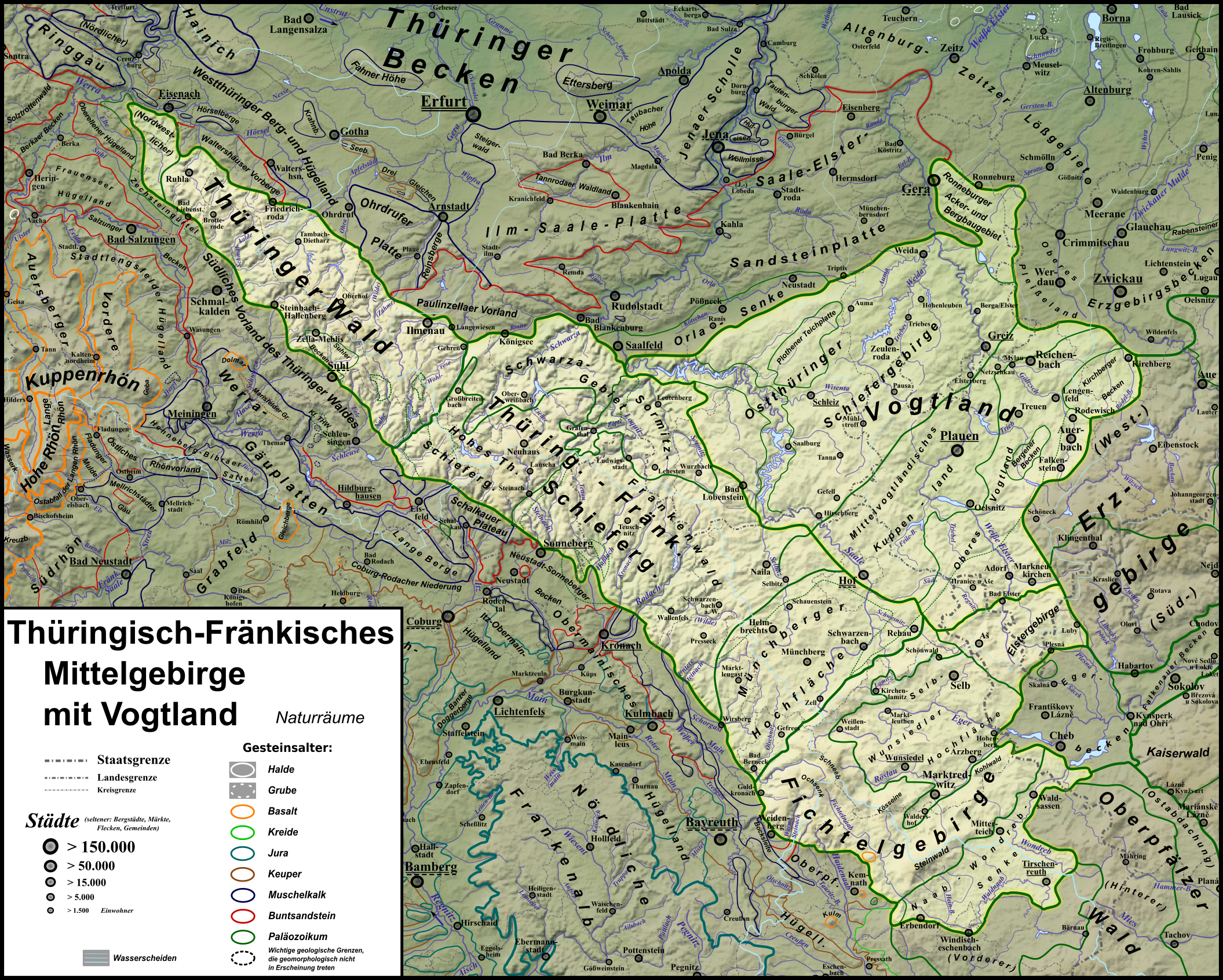 Naturraumkarte der naturräumlichen Großregion 3. Ordnung Thüringisch-Fränkisches Mittelgebirge inclusive des Vogtlandes.Die Zuordnung des Elstergebirges zum Fichtelgebirge entstammt, ähnlich wie die relativ schmale Eingrenzung des Nordostteils der Naab-Wondreb-Senke, Schönfelder (2008).Das südliche Vorland des Thüringer Waldes wird hier - wie auch in den meisten Publikationen seither und anders als im Handbuch der naturräumlichen Gliederung Deutschlands nicht zum Mittelgebirge gezählt.